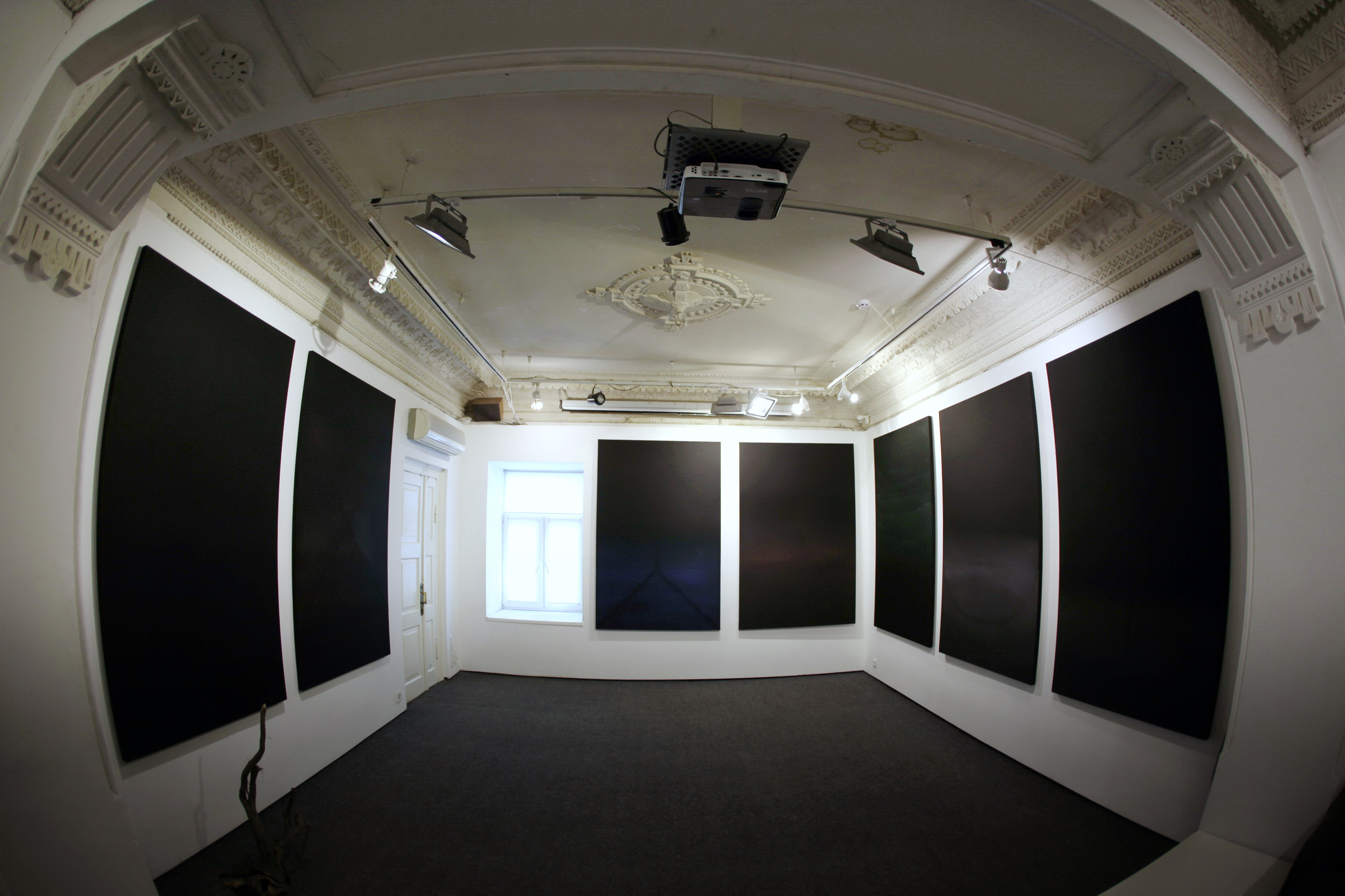 Карась Галерея. Експозиція виставки "Треба Було" Сергій Опанасенко. 2017 рік.